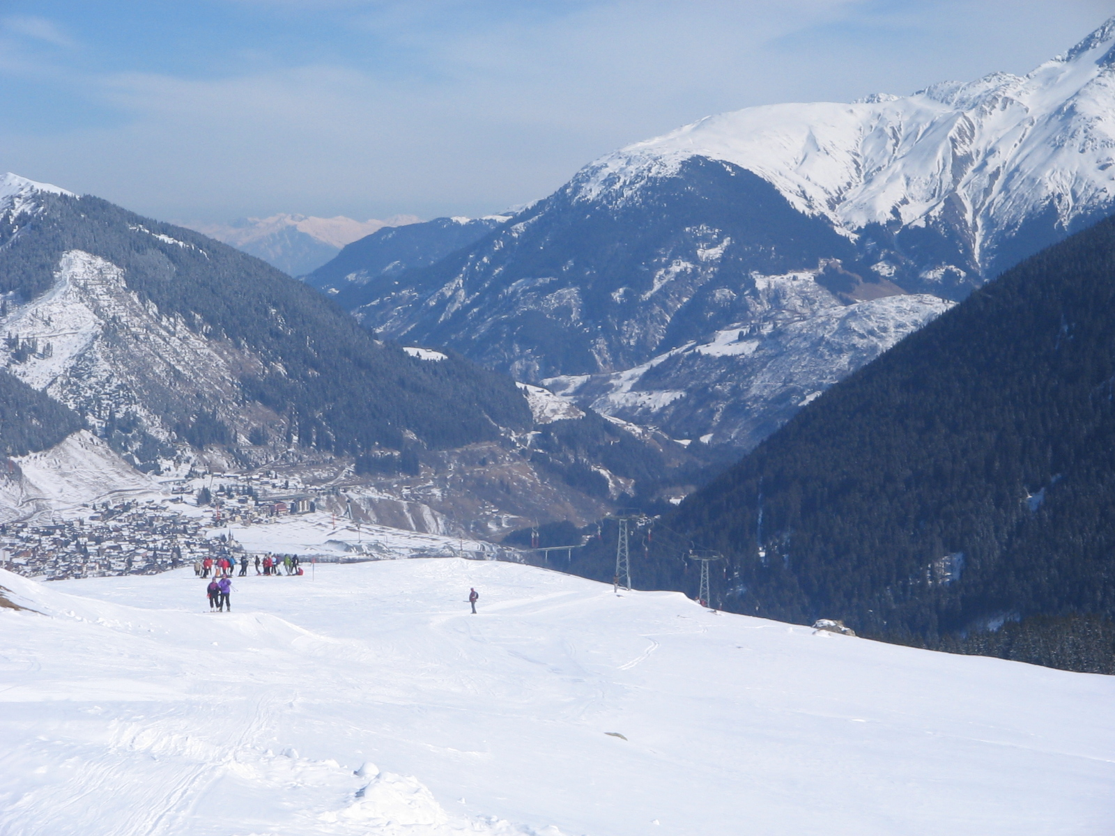 Skigebiet Dieni-Milez, Graubünden: Blick von Milez Richtung Tal (Sedrun)